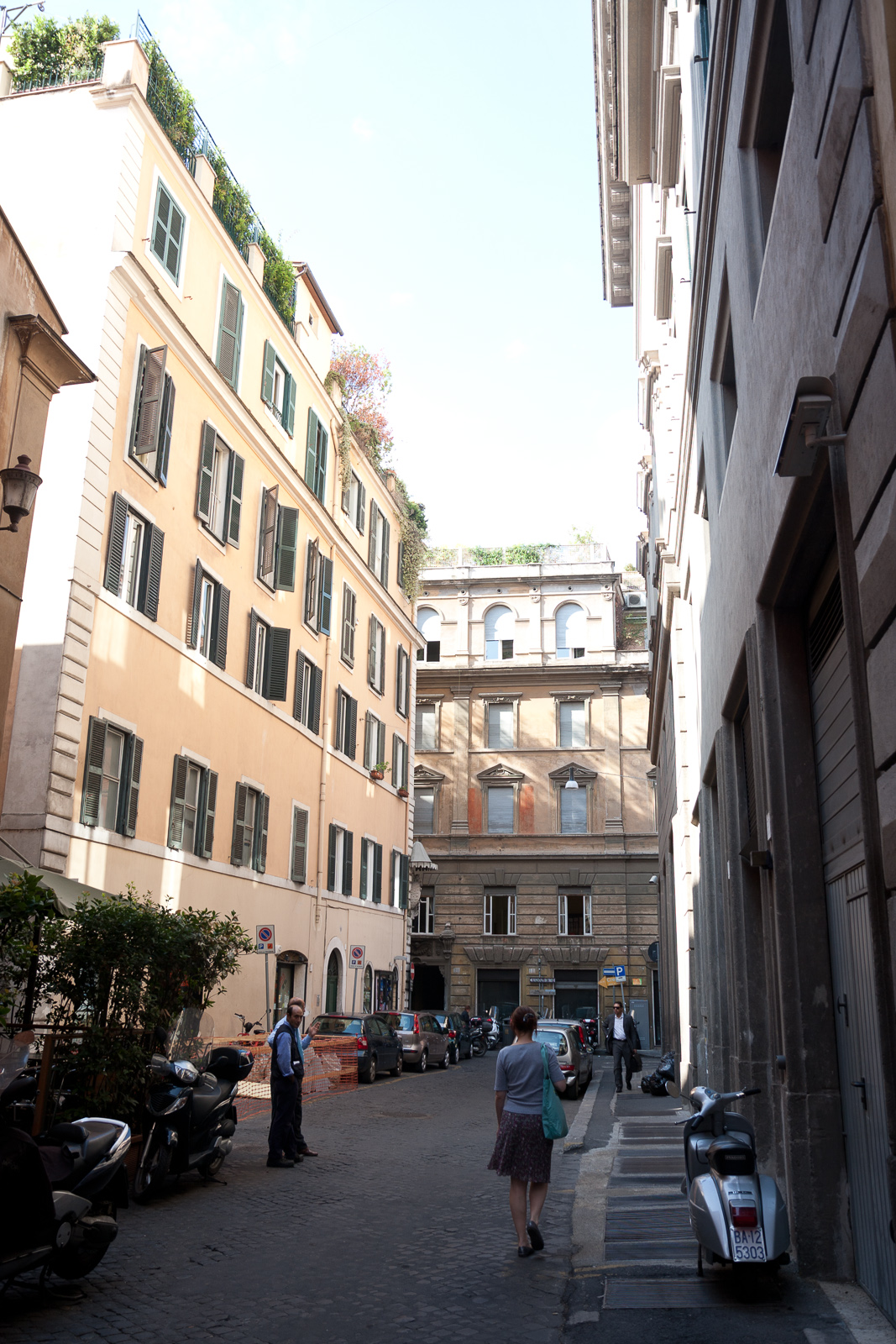 Rione II Trevi, 00187 Roma, Italy